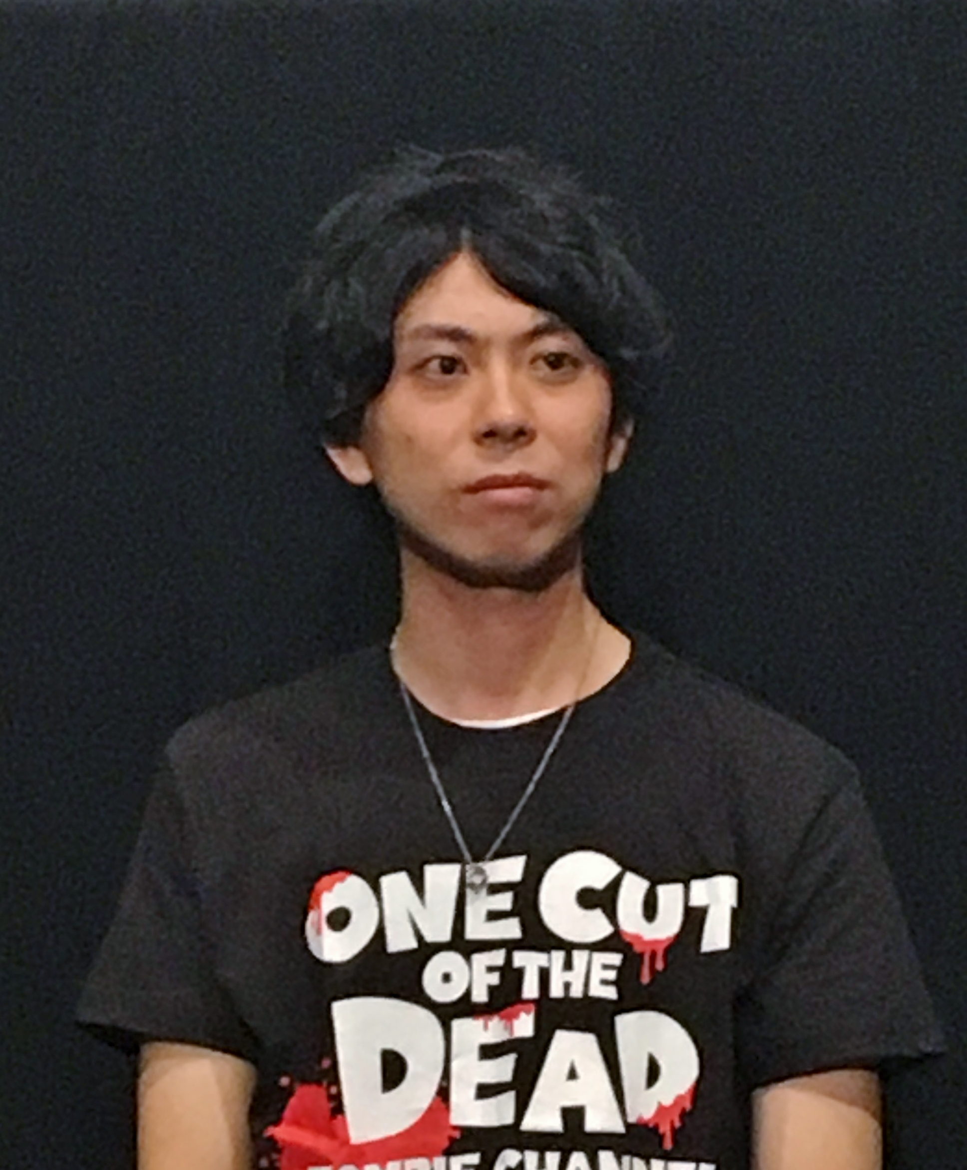 市原洋（2018年7月14日、チネチッタ川崎「カメラを止めるな!」舞台挨拶）